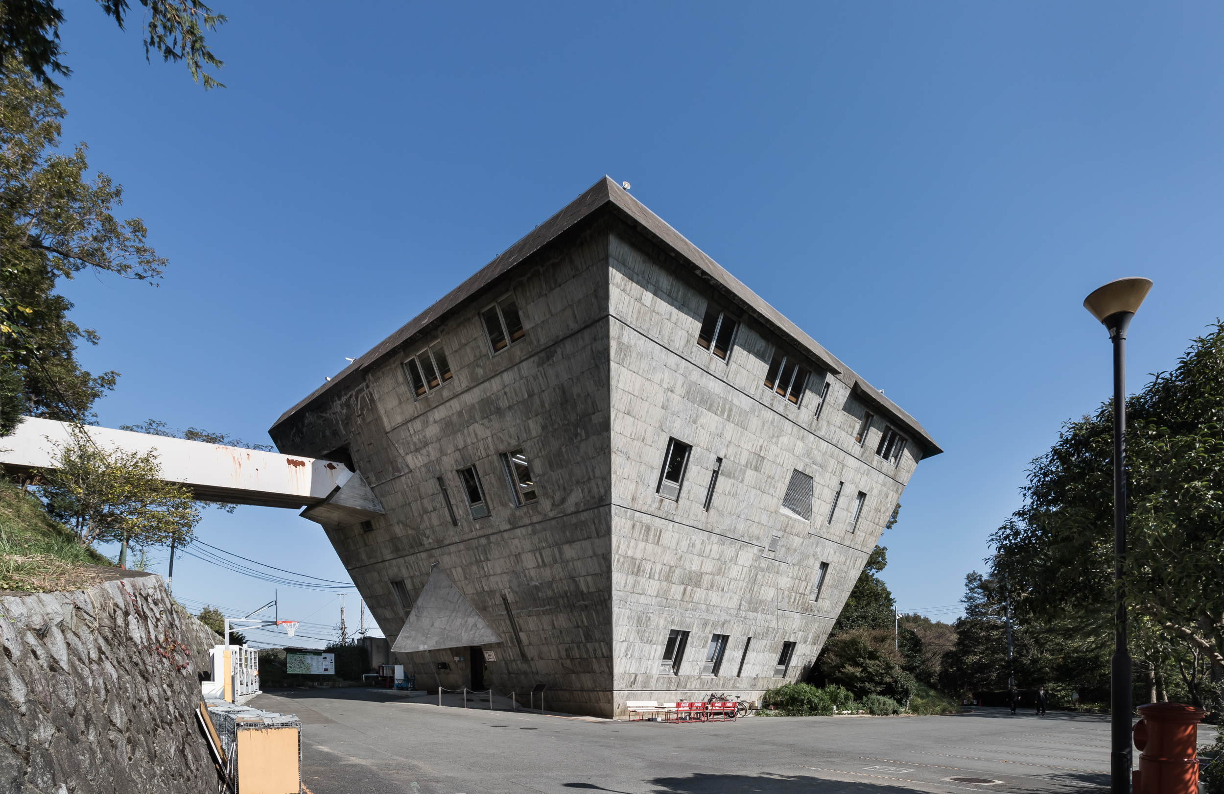 大学セミナーハウス（東京都八王子市）、本館。 吉阪隆正+U研究室設計。